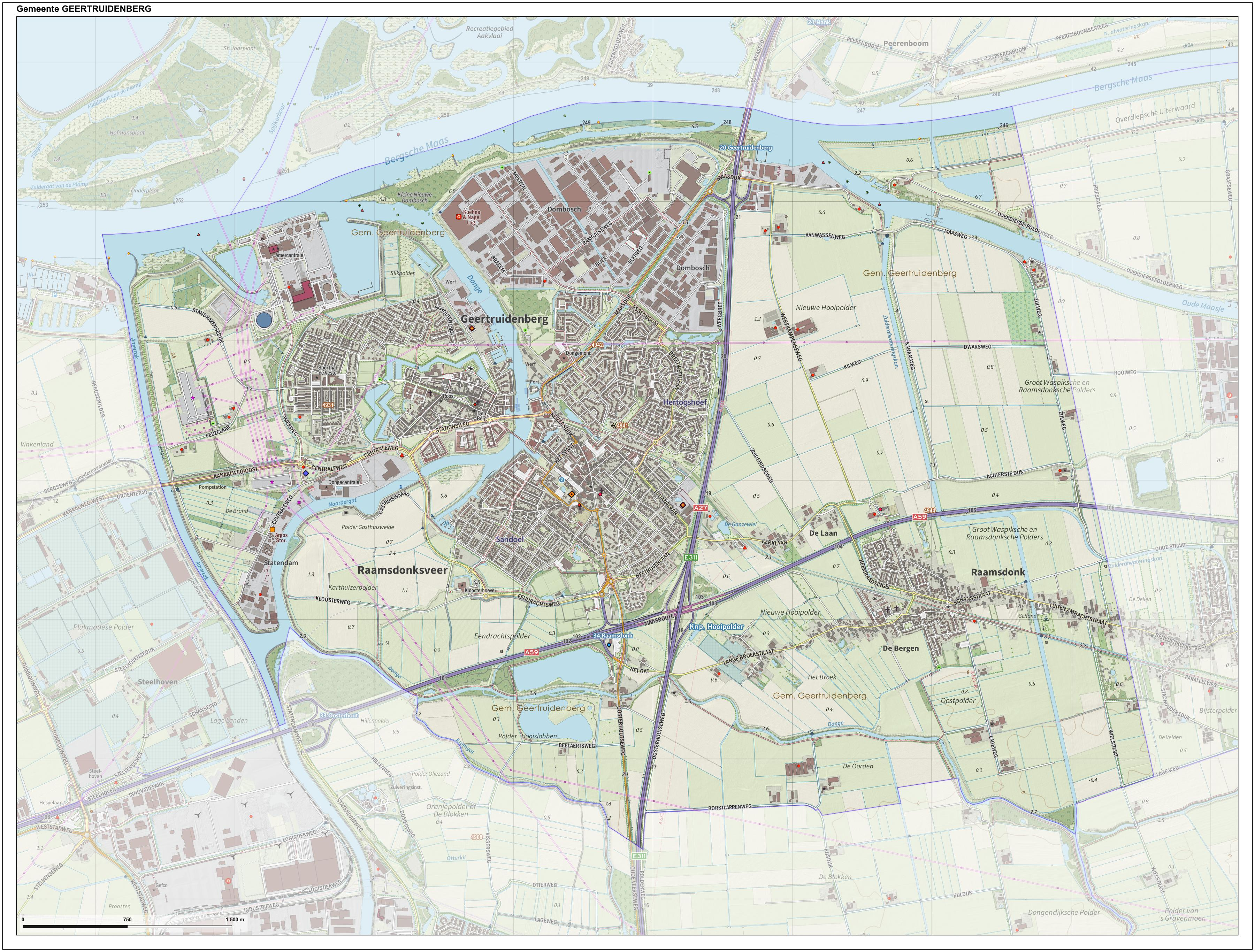 Topografische gemeentekaart. Resolutie: 400 pixels/km. Kaartbeeld samengesteld uit de open geodata van de Top10NL en Top25namen (Kadaster), Creative Commons-BY licentie. Gebouwvlakken uit open geodata BAG extract. Wegen uit de OpenStreetMap, OpenStreetMap community. Reliëfschaduw uit de Actuele Hoogtekaart AHN2. Samenstelling en kleurenschema: Jan-Willem van Aalst, met QGIS. Zie ook de Legenda.